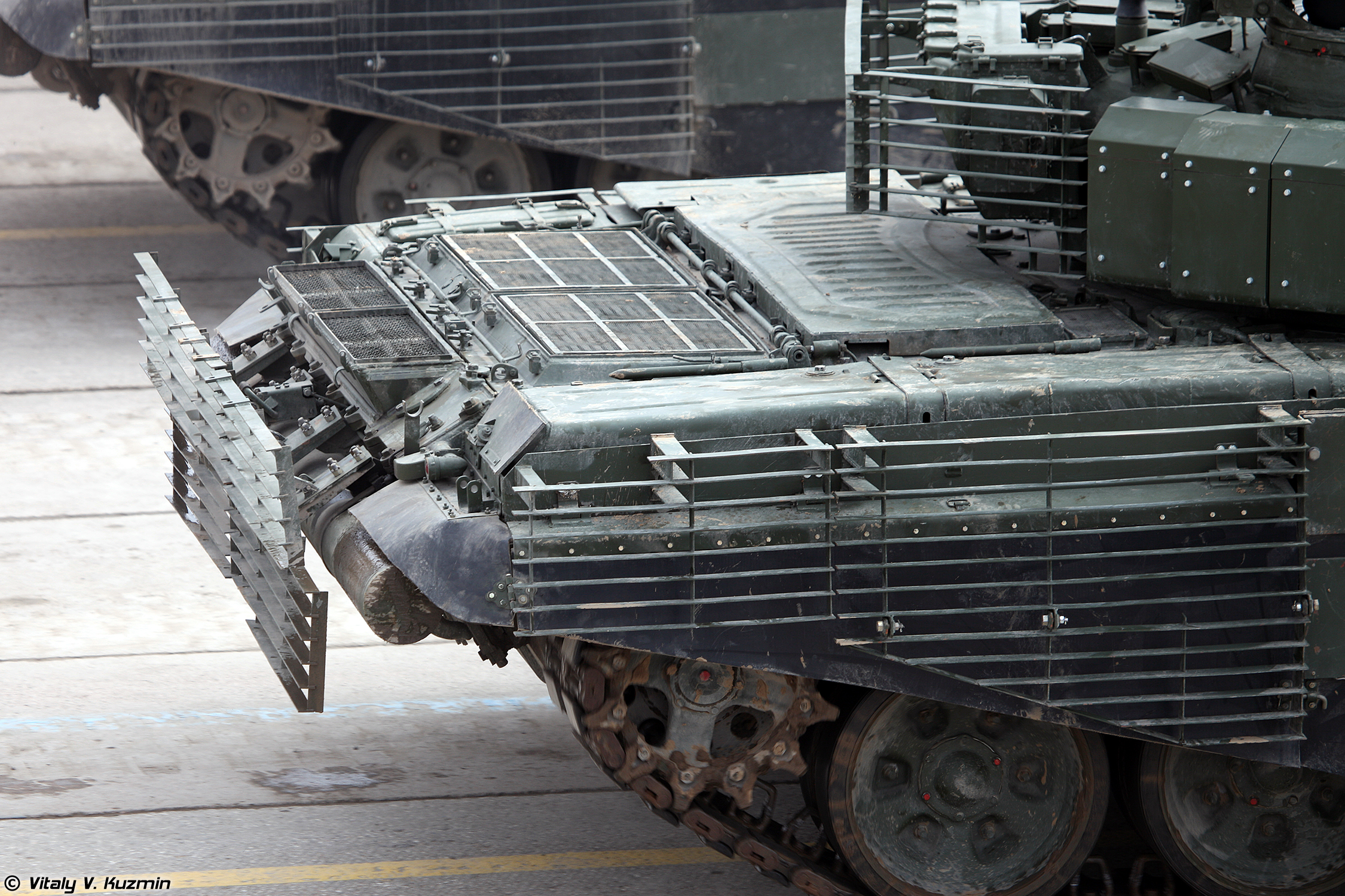 Модернизированный Т-72Б3 образца 2016 года с дополнительной защитой (Modernized T-72B3 with additional armor)